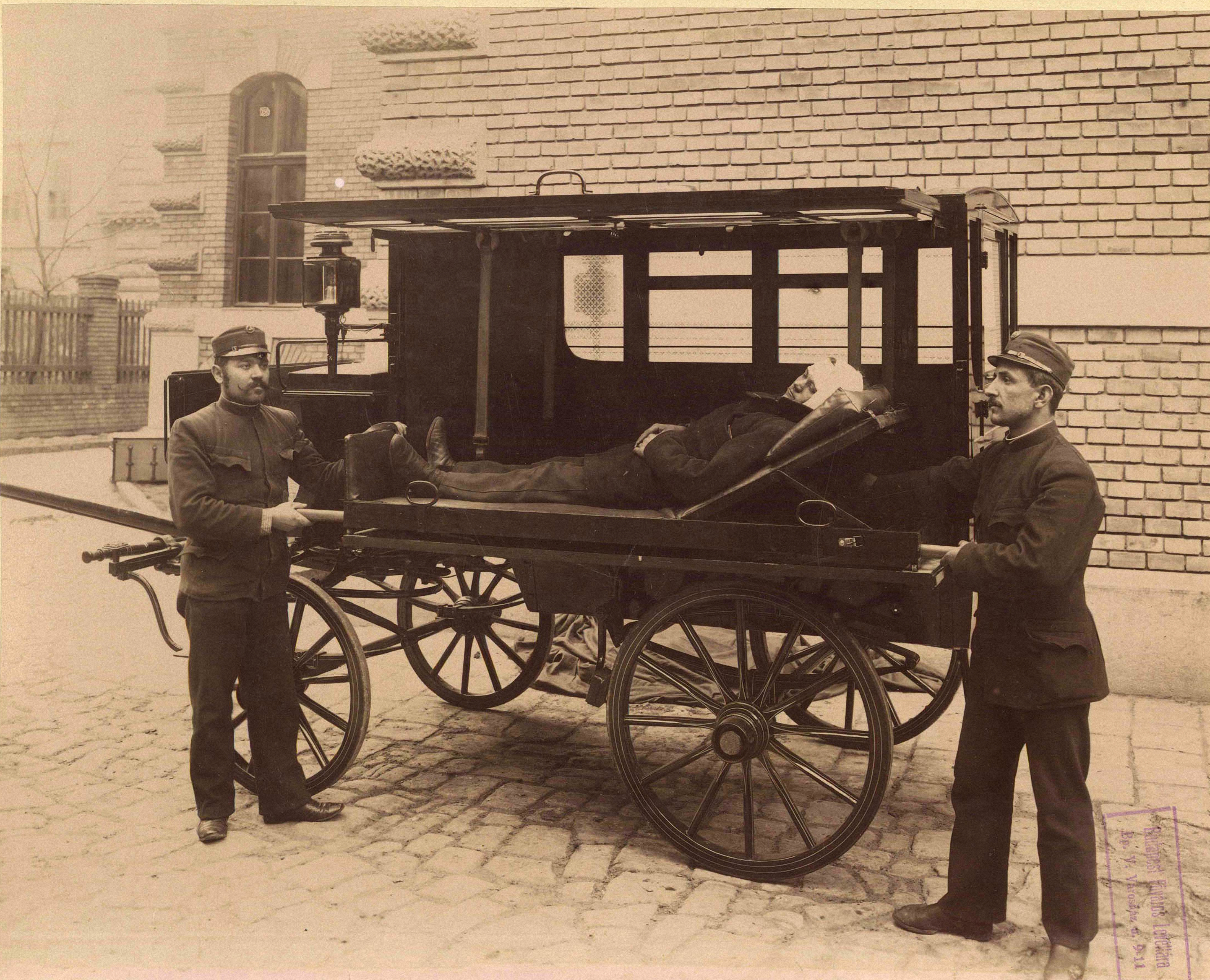 Budapest V. Markó utca 22., az Országos Mentőszolgálat, ekkor a Kresz Géza által megalapított Budapesti Önkéntes Mentő Egyesületet (BÖME) központjának udvara. A Millenniumi kiállításhoz kapcsolódó bemutató: korabeli betegszállító mentőjármű és személyzete. A felvétel 1896-ban készült. A kép forrását kérjük így adja meg: Fortepan / Budapest Főváros Levéltára. Levéltári jelzet: HU.BFL.XV.19.d.1.10.250